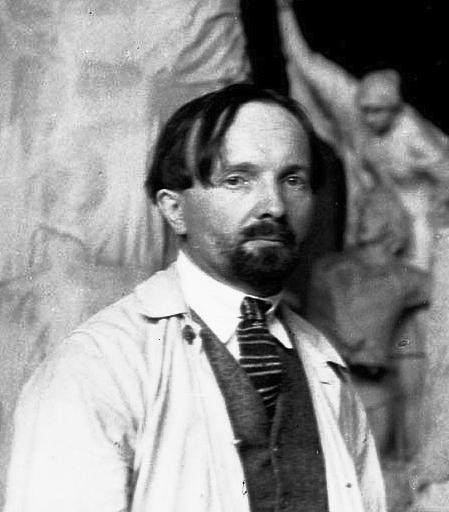 Alfred Laliberté, sculpteur